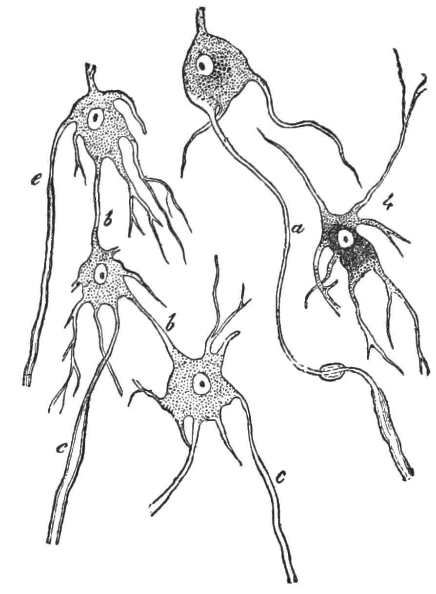 Motor nerve cells